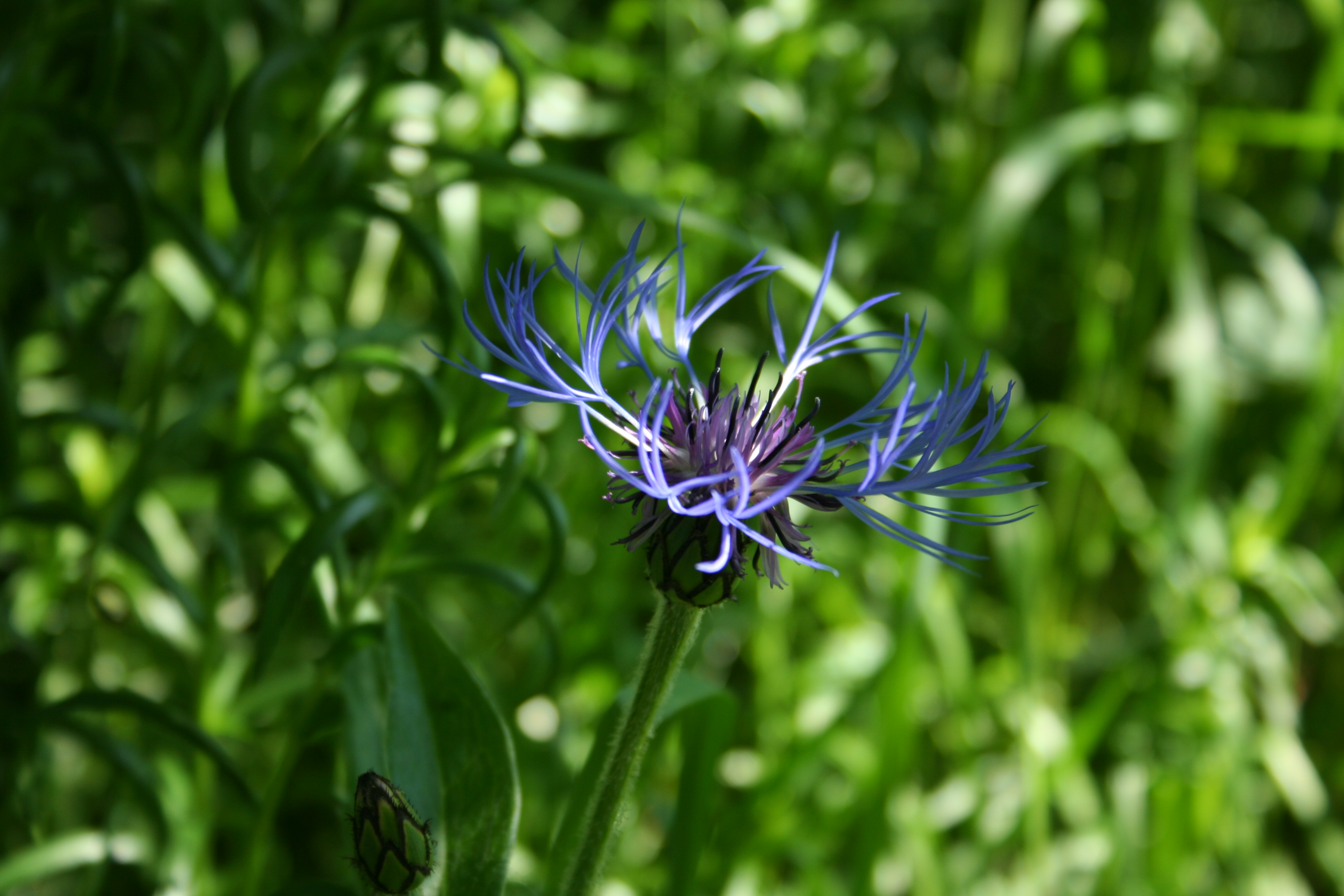 Centaurea montana